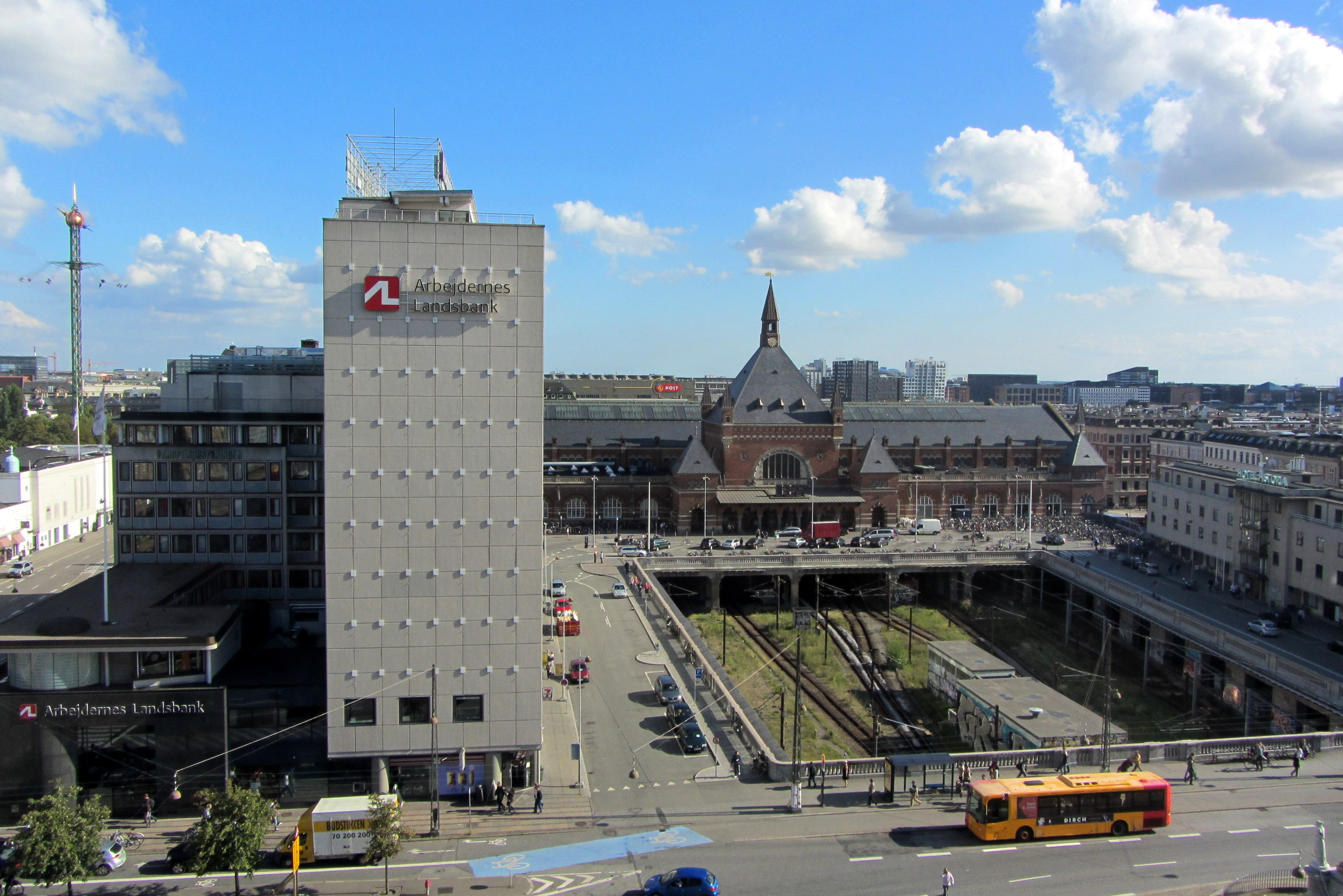 Arbejdernes Landsbank next to Copenhagen Central Station in Copenhagen, Denmark